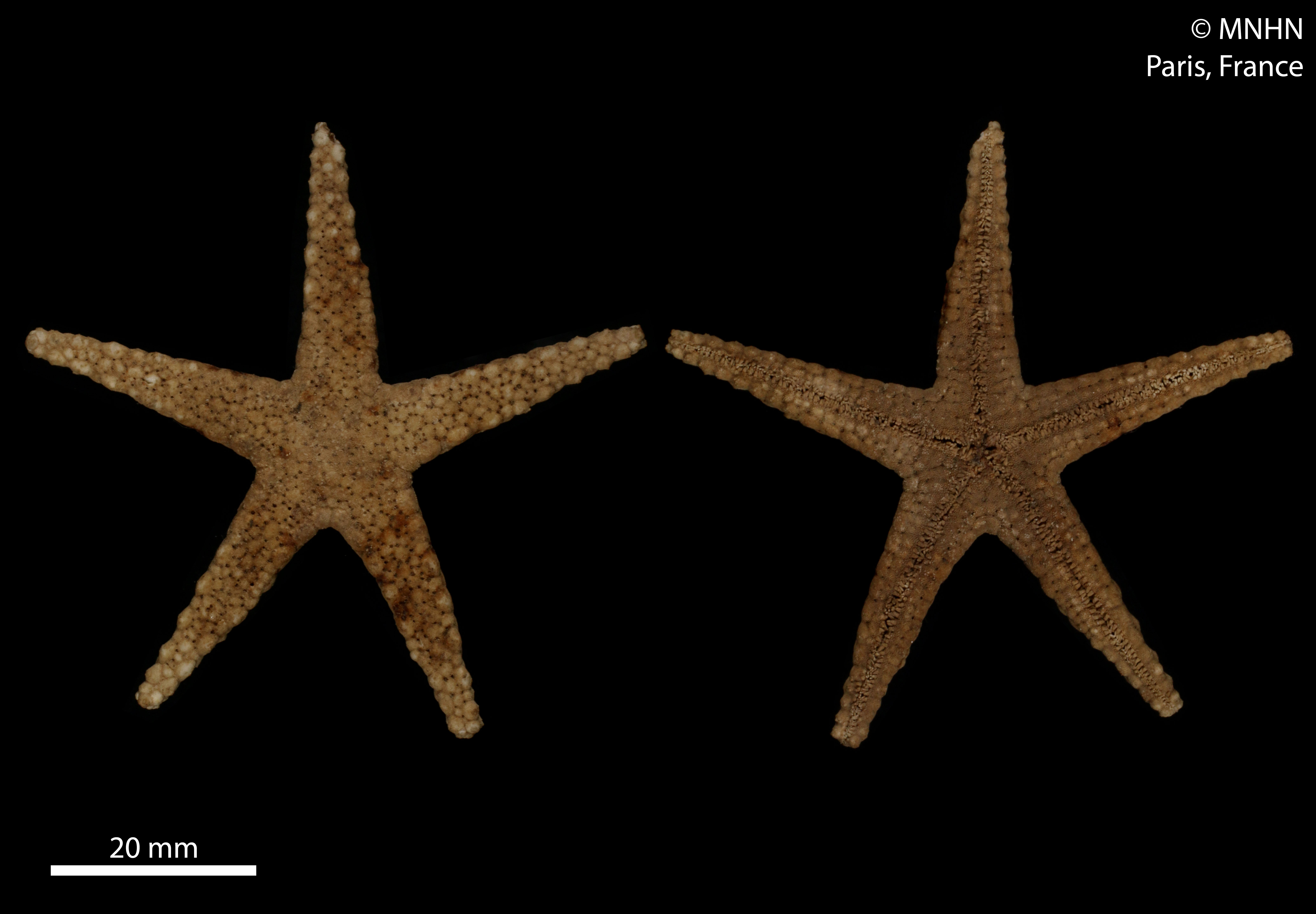 Fromia monilisSpécimen MNHN-IE-2014-58, sous la dénomination Scytaster monilis Perrier, 1869Collection : Échinodermes (IE)Muséum National d'Histoire Naturelle (Paris, France) Origine : Localité/Lieu-dit : Mers des Indes